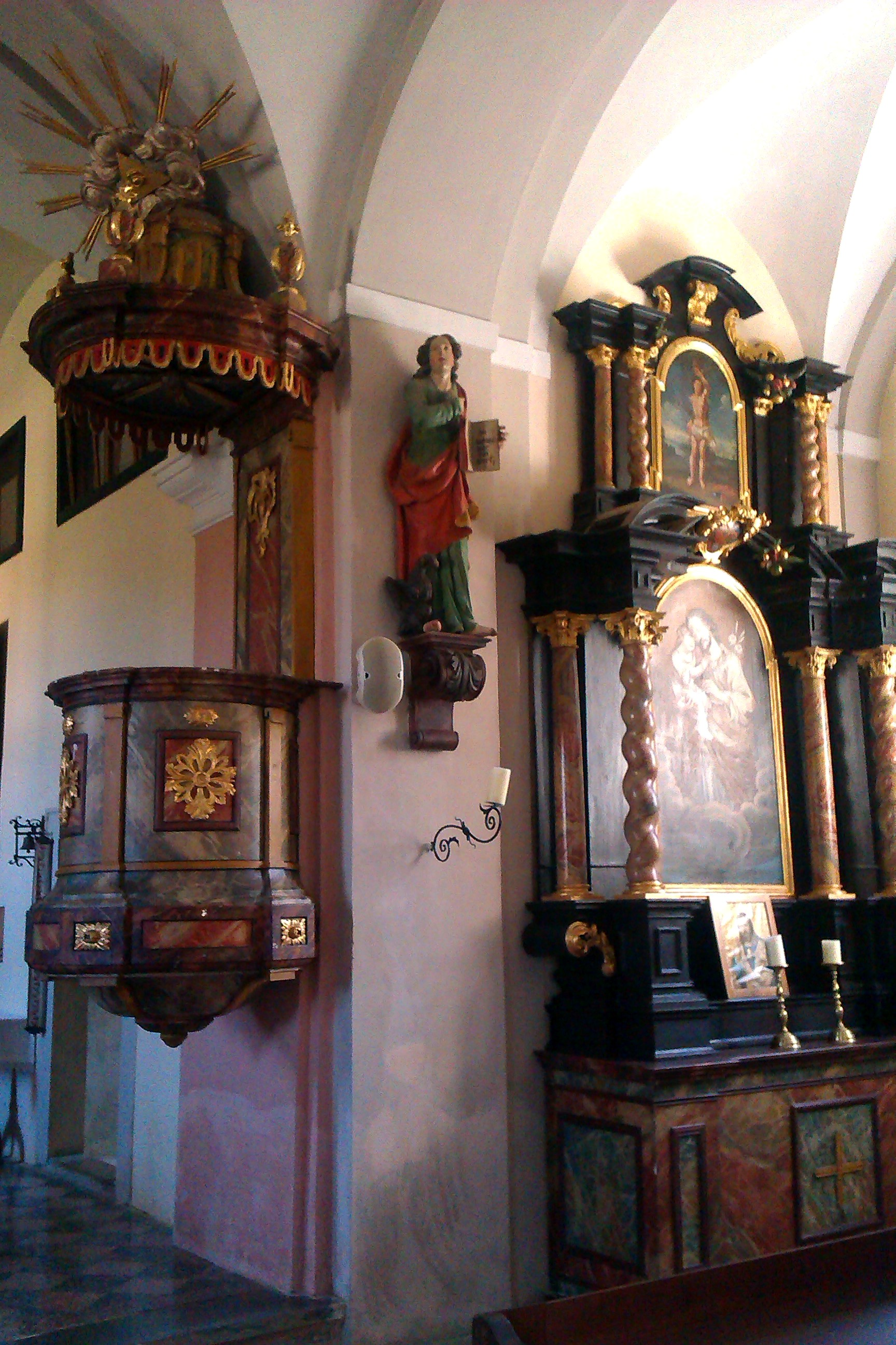 Kath. Filialkirche hl. Jakob